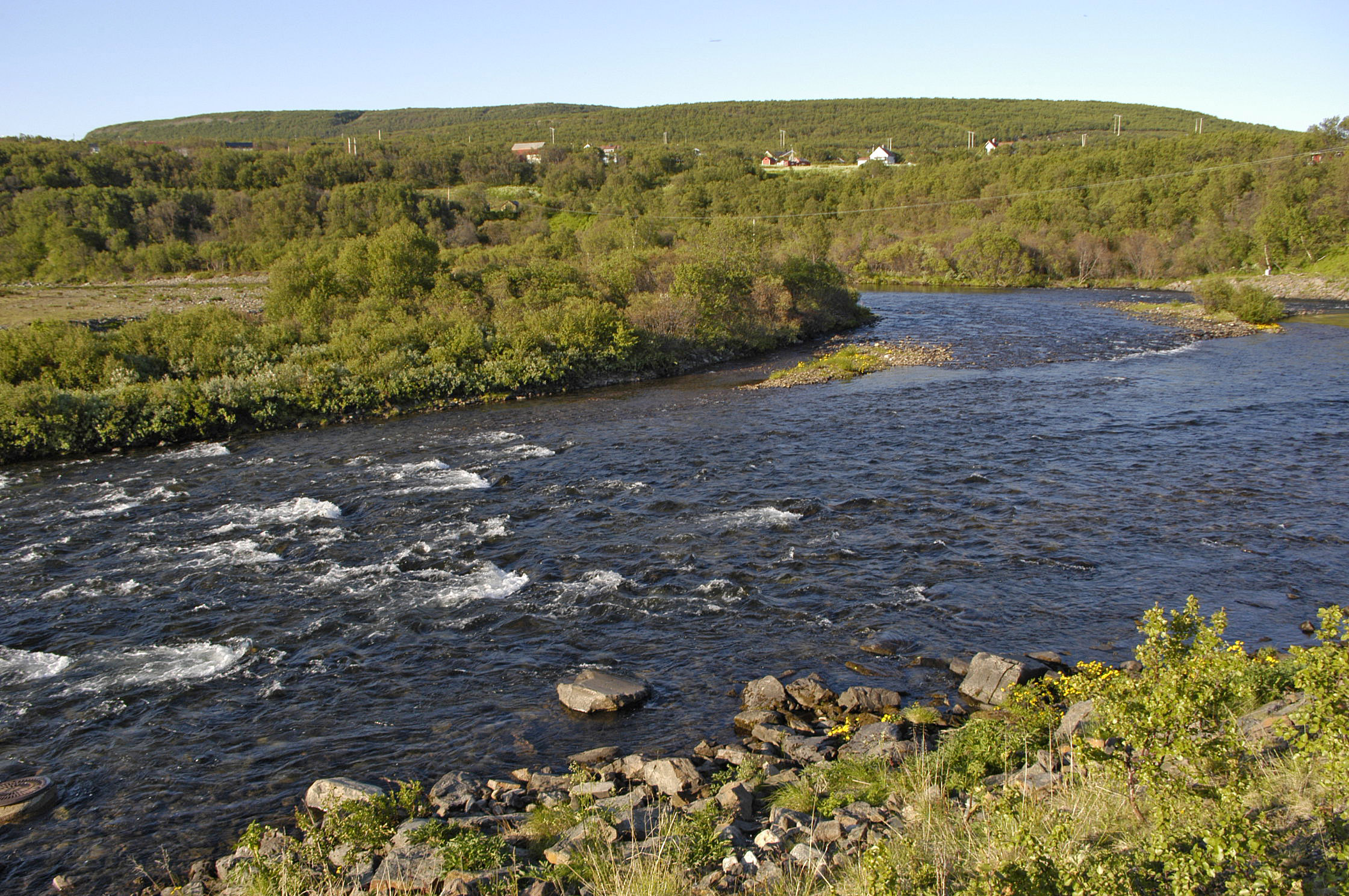 Jakobselva river near Vestre Jakobselv in Vadsø, Norway